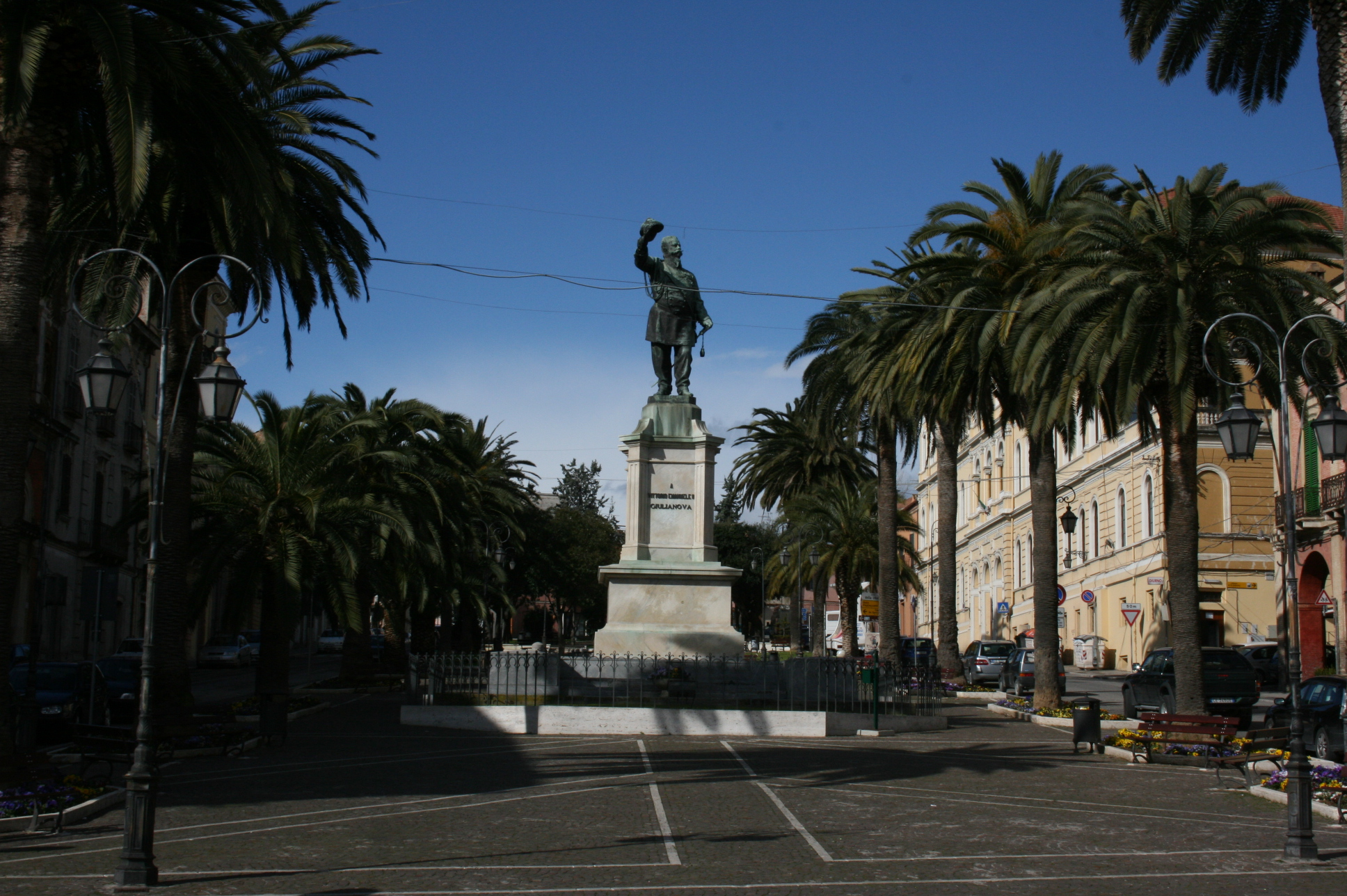 Giulianova, piazza de la libertà